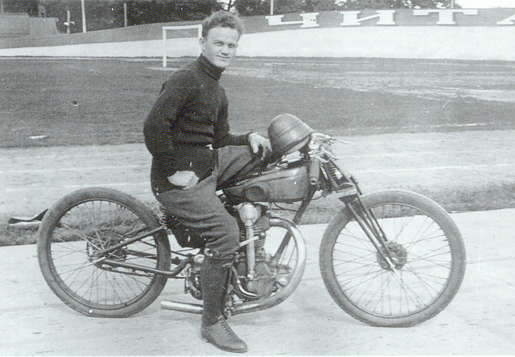 Chater Lea 350 Facecam 1929.